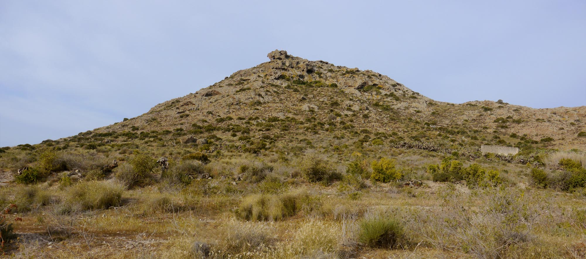 Sideritis pusilla en El Carmolí, Cartagena (España)